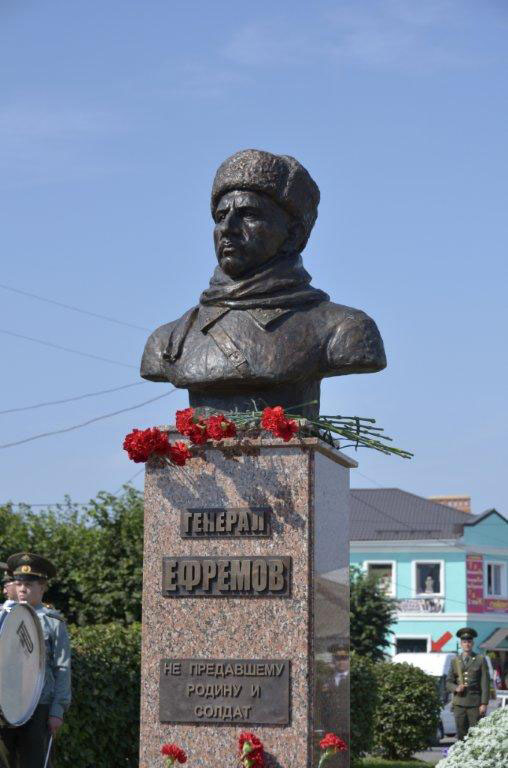 Памятник генералу М. Г. Ефремову в Тарусе. Работа скульптора Александра Казачка. Август 2011 года